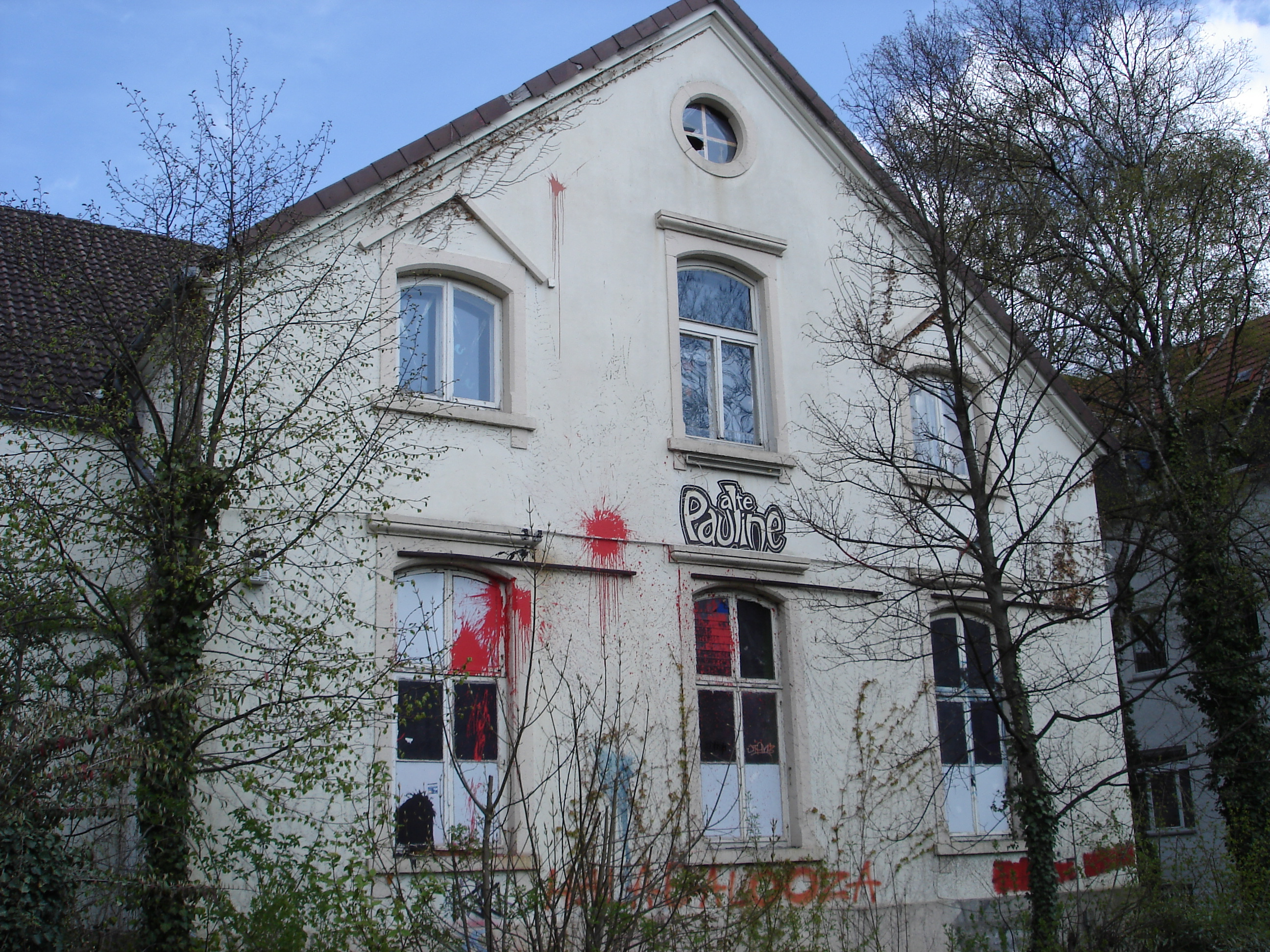 Alte Pauline, autonomes Kultur- und Kommunikationszentrum in Detmold, Nordrhein-Westfalen, Deutschland This is a photograph of an architectural monument.